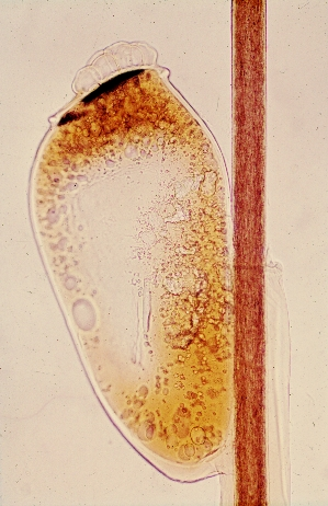 Head louse egg